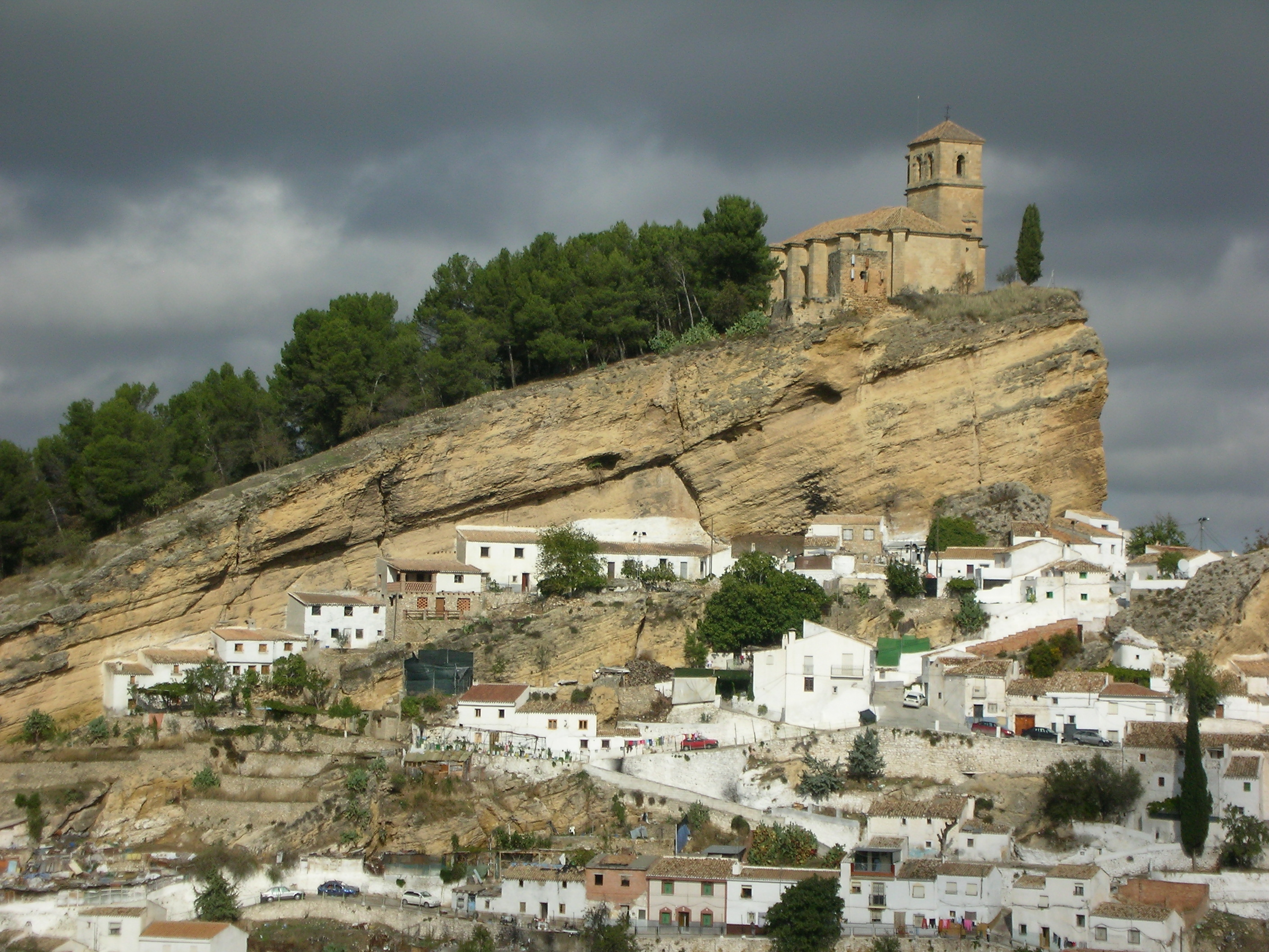 Vista del cerro con los restos de la antigua fortaleza y la iglesia, hoy Centro de Interpretación el Centinela de Montefrío, Granada, España.